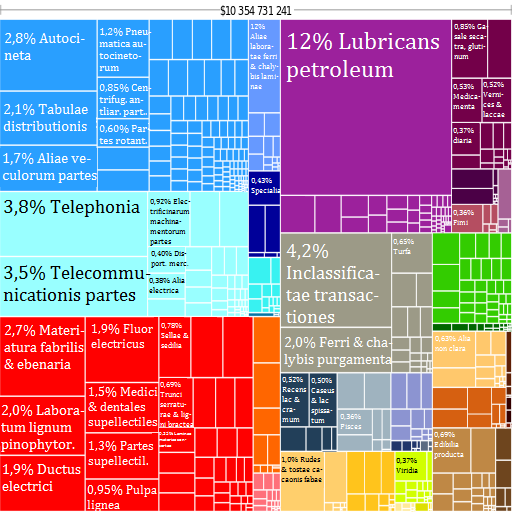 Graphica de Estoniae exportationibus